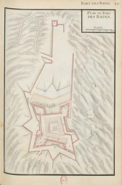 Fort dels Banys, plànol del 1693, a Recueil des plans des environs de plusiers places du Royaume faits en l'an 1693, [París], pl. 45